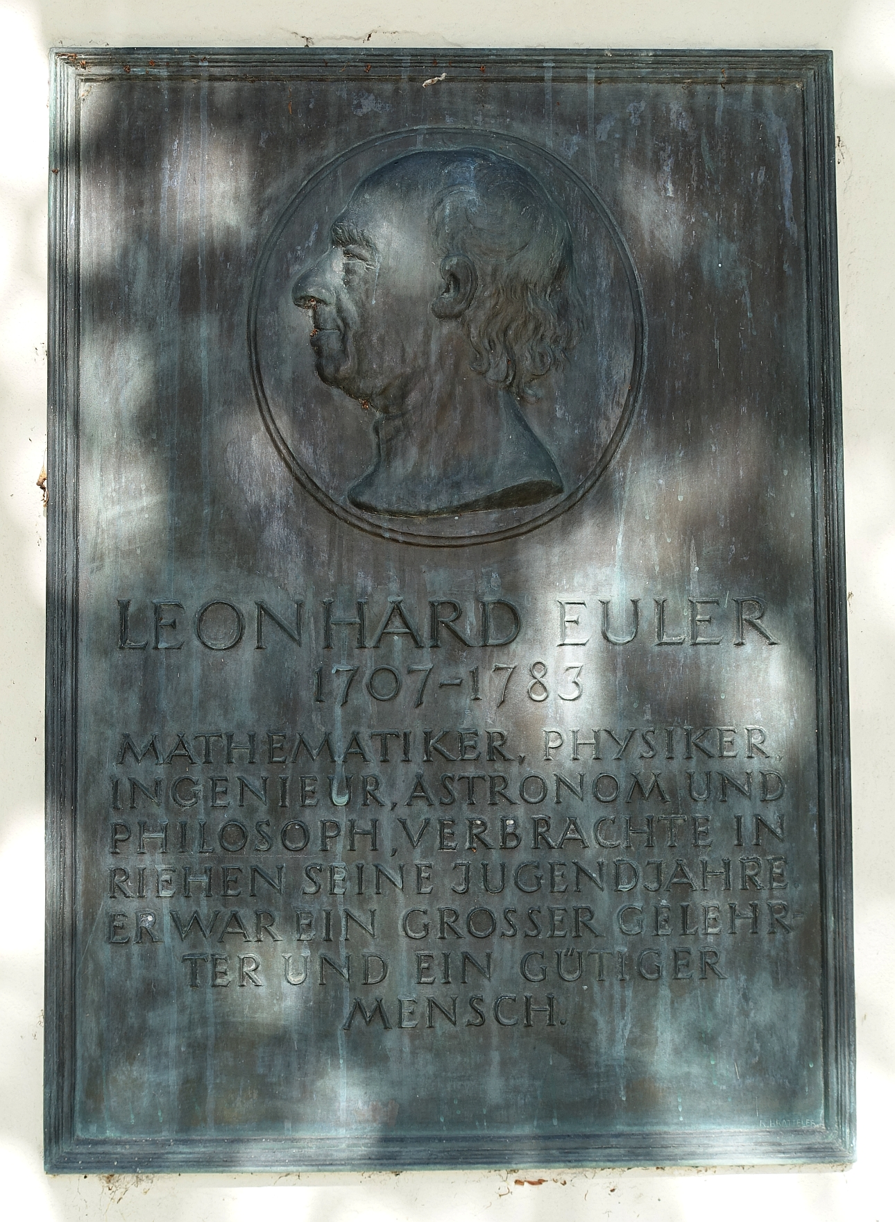 Gedenktafel für Leonhard Euler (1707-1783), gestaltet von Hedwig Frei (1905–1958), Dorfkirche Sankt Martin. Riehen, Schweiz